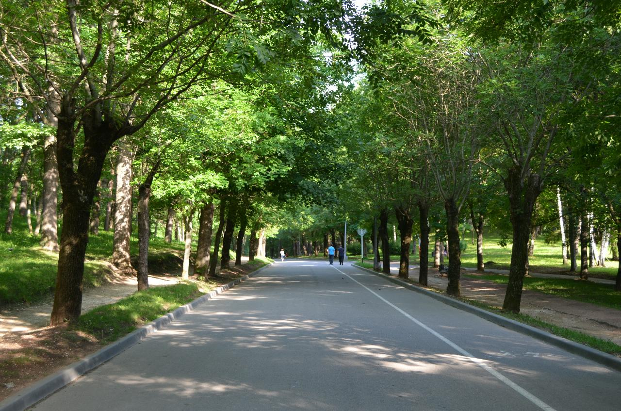 Дорожка в курортном парке Кисловодска